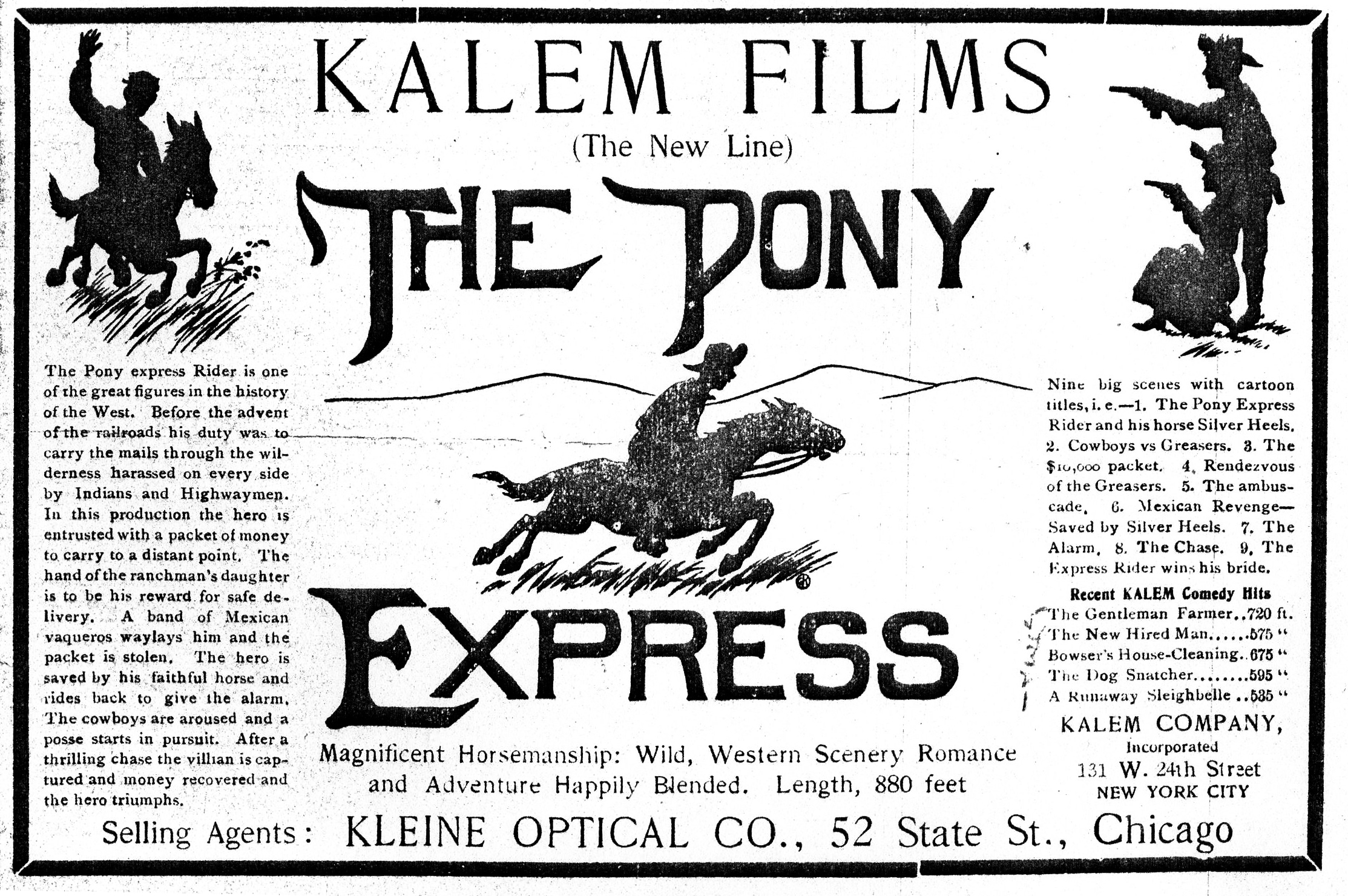 Publicité parue dans The Moving Picture World, du film The Pony Express (1907), produit par Kalem. Le premier réalisé par Sidney Olcott